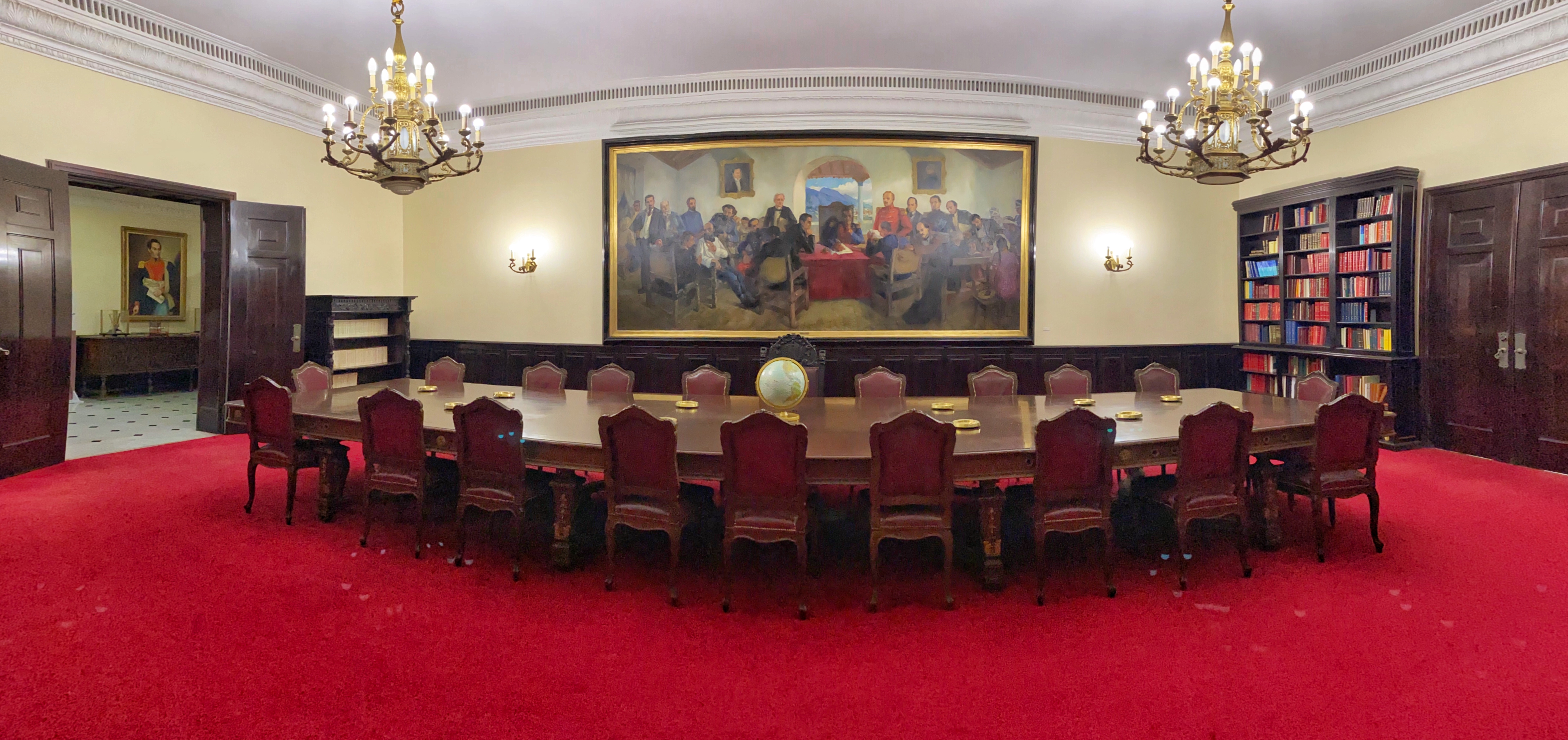 Salón del Consejo de Ministros de la antigua Residencia Presidencial La Casona, convertida a partir de 2019 en centro cultural.